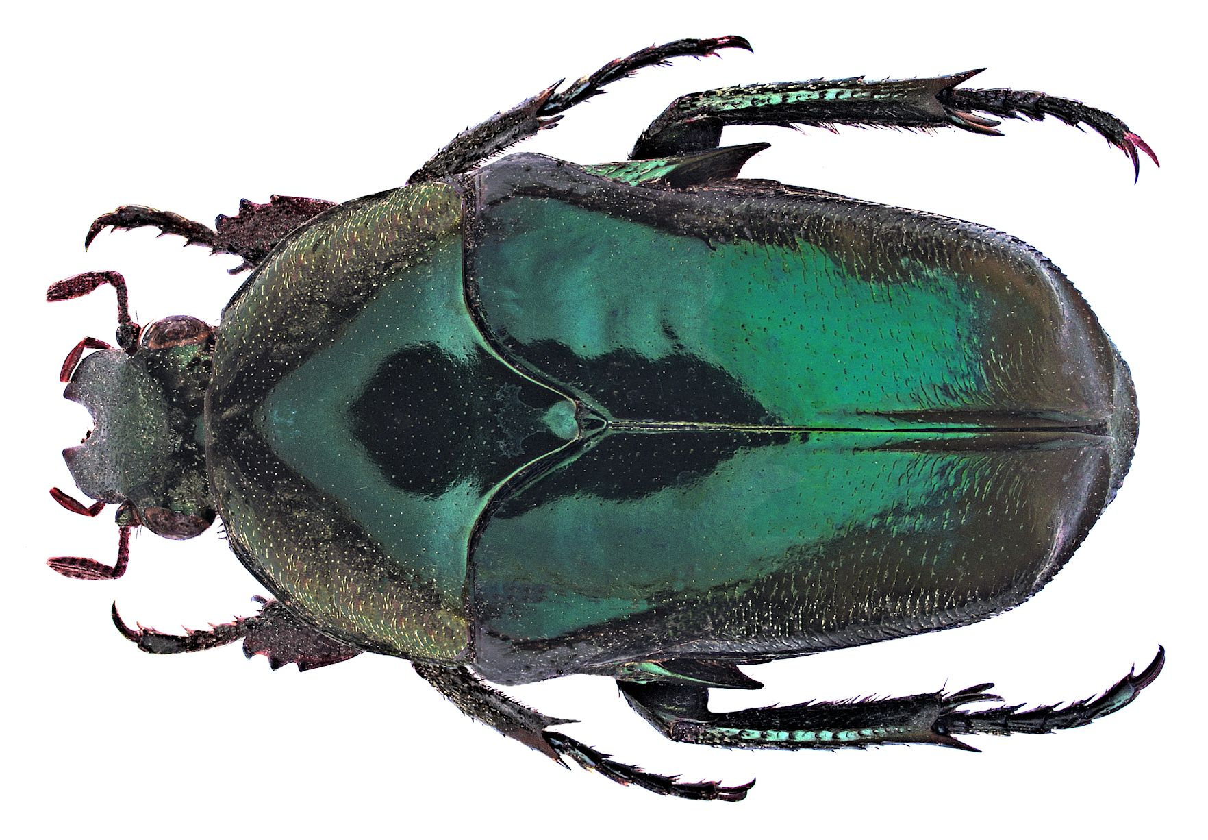 Familie: Scarabaeidae Groesse: 23,8-30,7 mm Fundort: Australien, Key-Isl. det. U.Schmidt, 2006 Photo: U.Schmidt, 2006